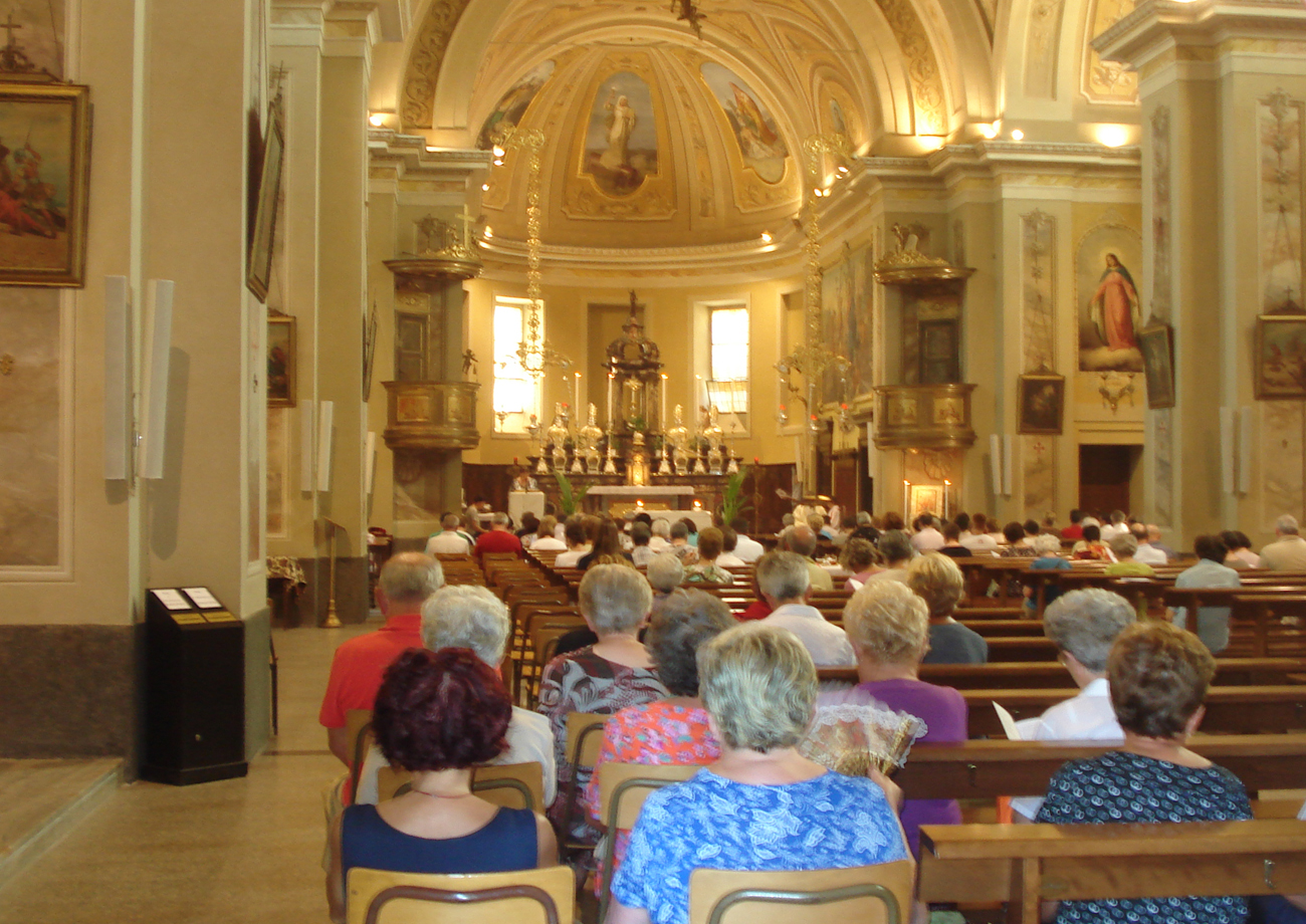 La chiesa di Cornaredo durante la Messa Vigiliare dell'Assunta